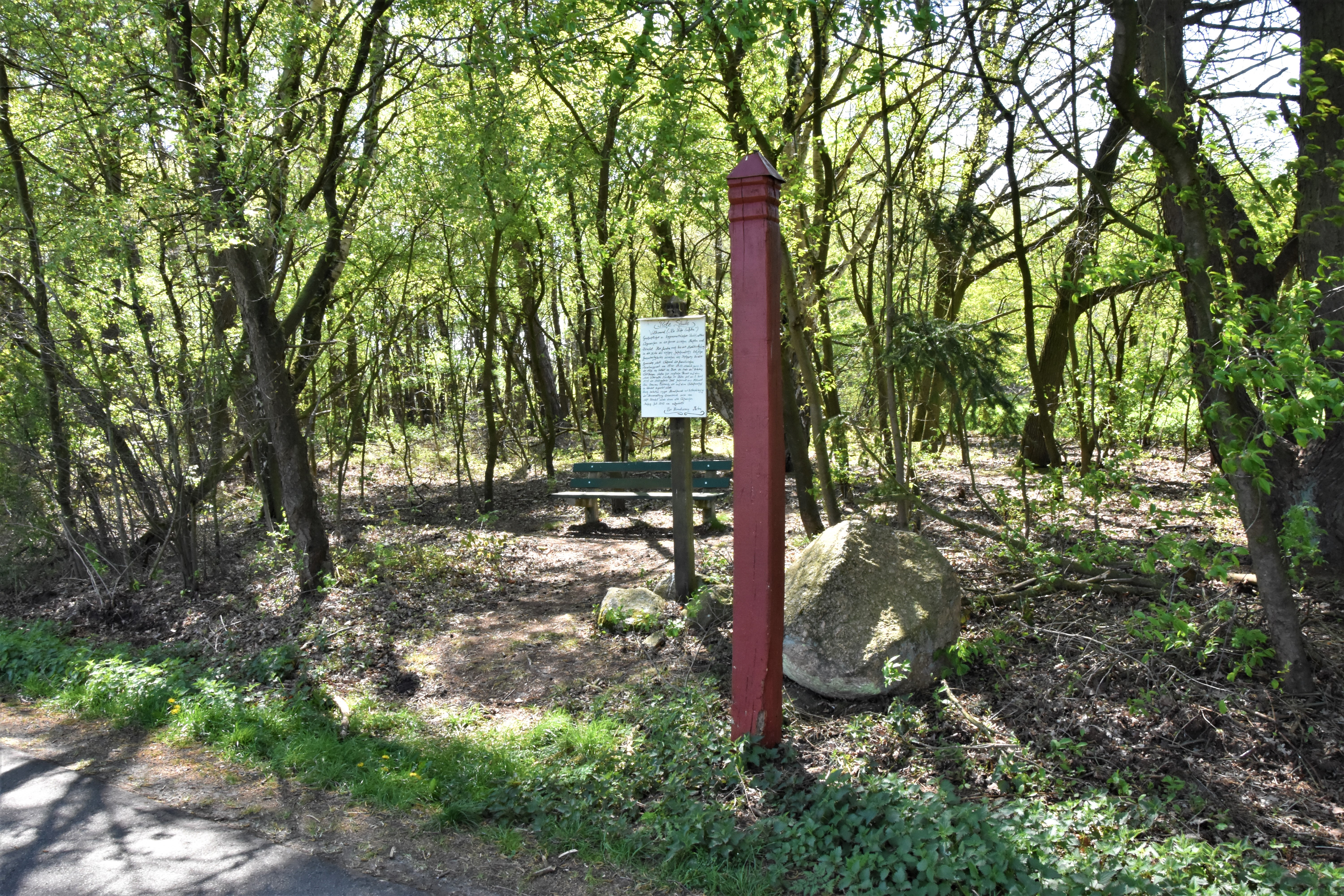 Die Grenzmakierung "Rote Säule" zwischen Berge-Anten und Menslage-Hahlen. Die Straße gehört zu Menslage, der Wald hinter der Säule teilweise zu Berge.